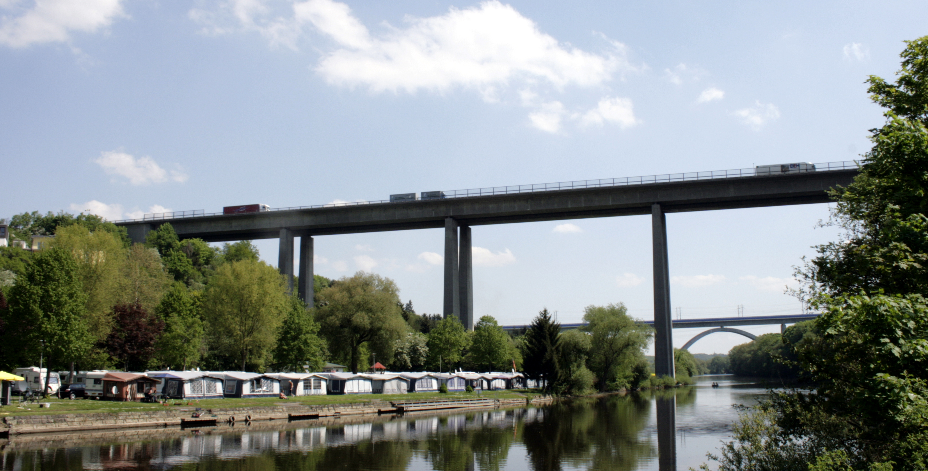 Autobahnbrücke der A3 über das Lahntal bei Limburg, Deutschland, im Hintergrund die ICE-Brücke